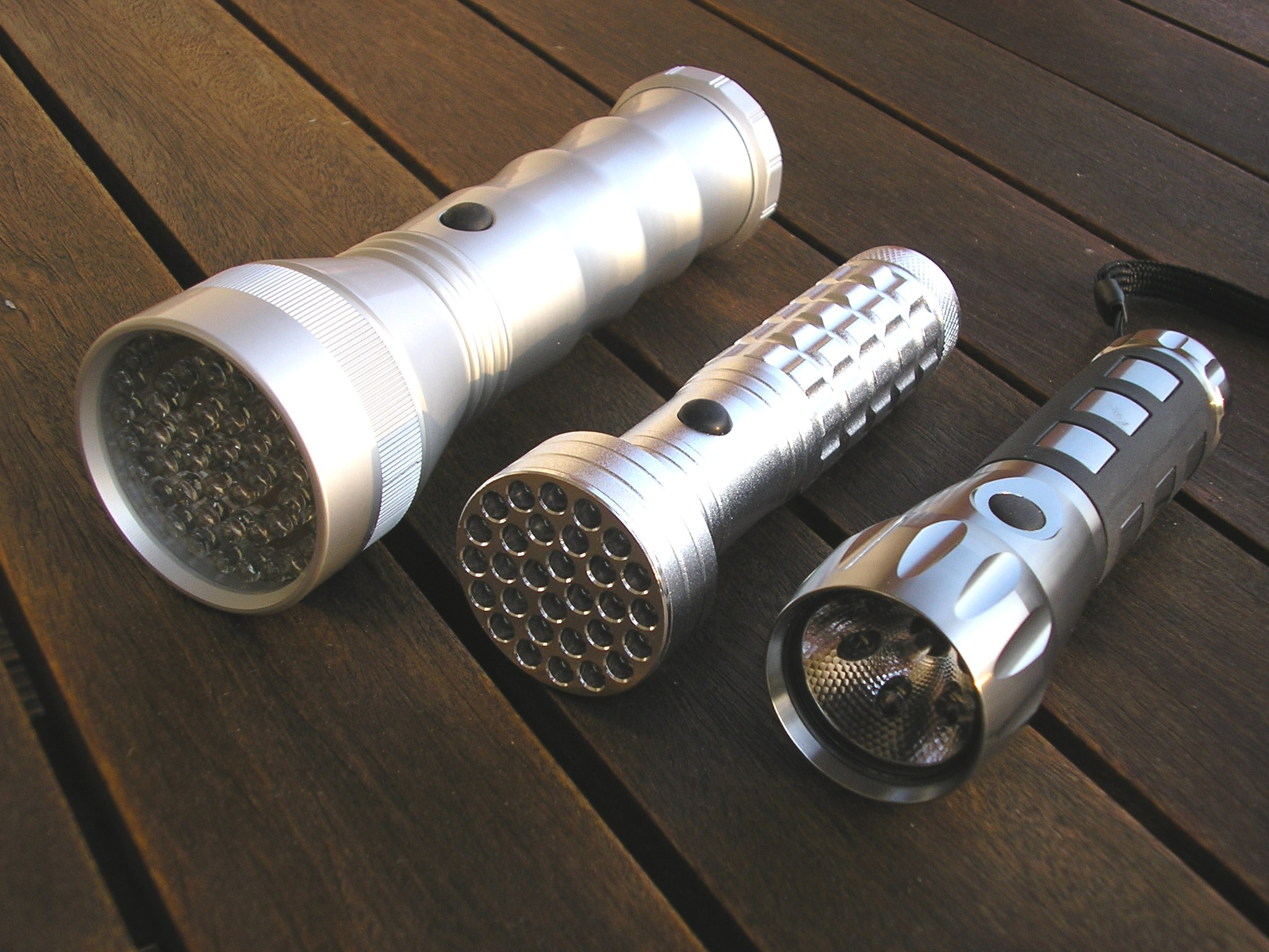 3 LED-Taschenlampen